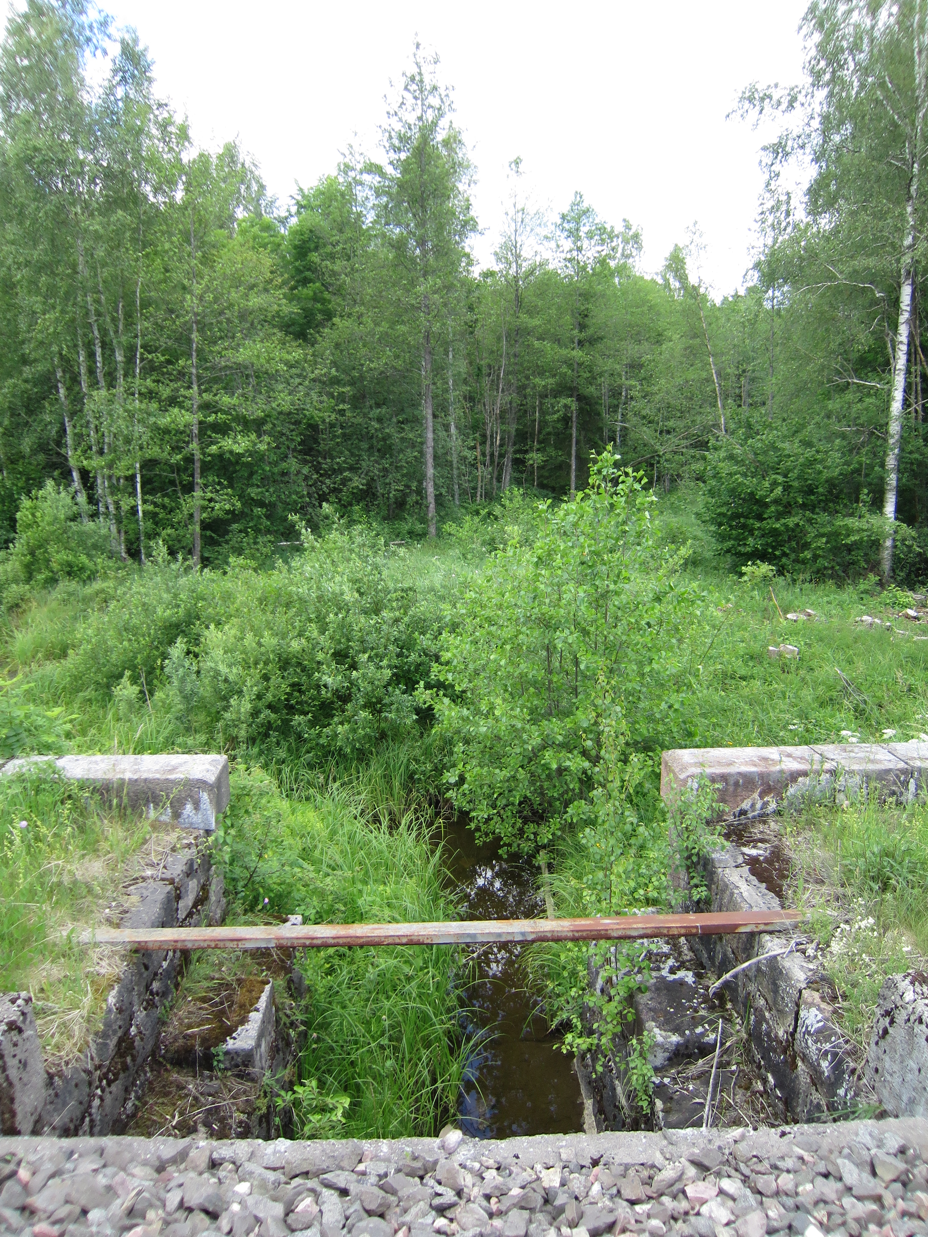 Alkšņupe pie Glūdas—Reņģes dzelzceļa tilta